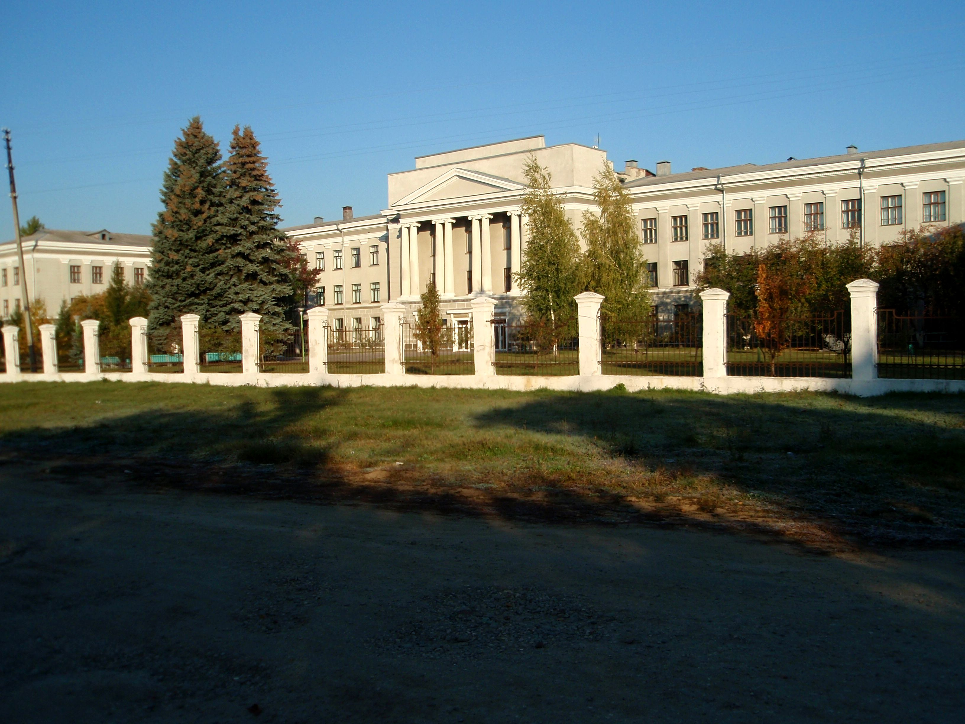 Будинок авіаційного інституту, Харків, вул. Чкалова, 17, на території ХАІ